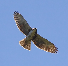 Buteo albigula, imagen tomada en el parque Nahuelbuta, Araucanía Region, Chile